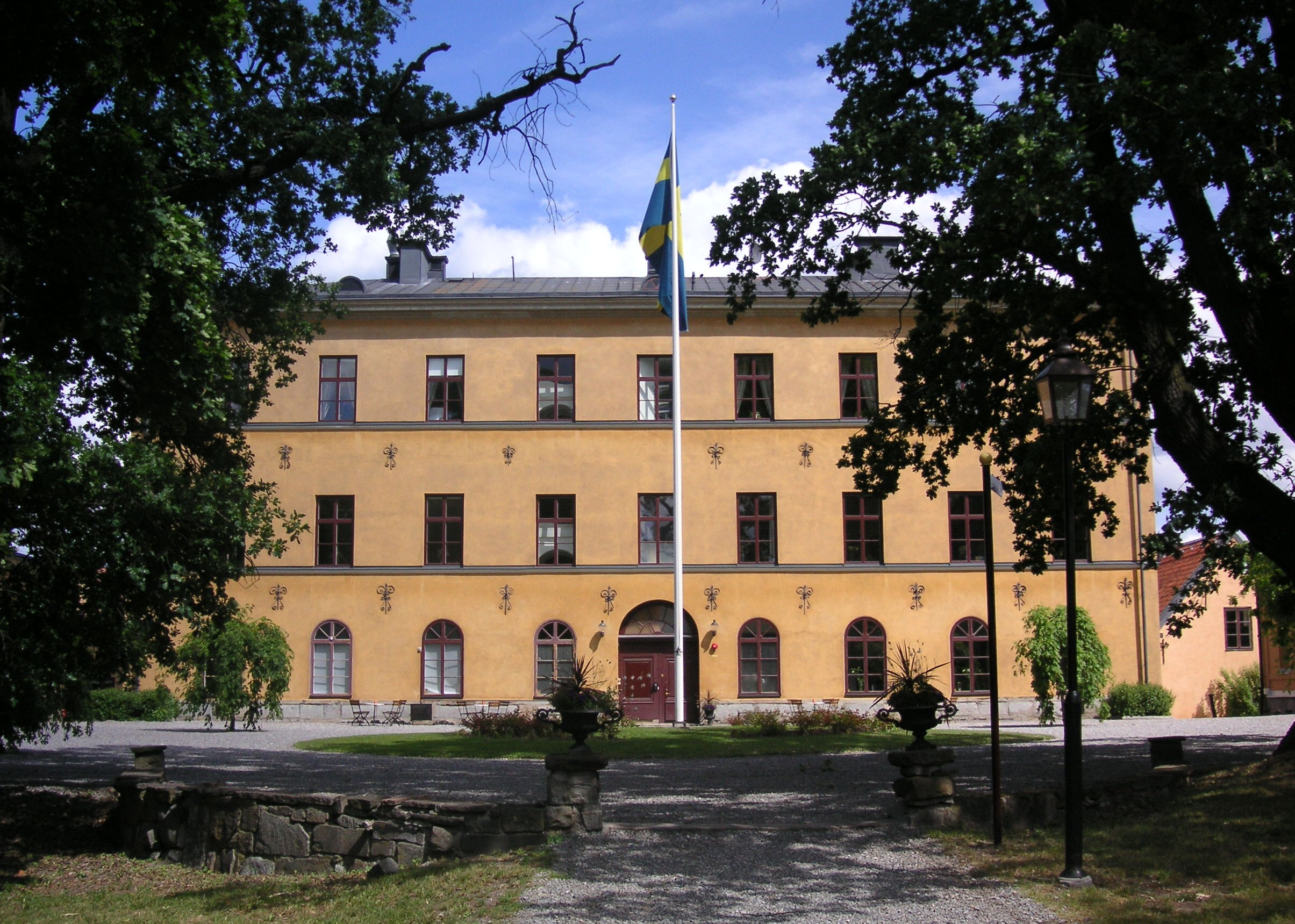 Ulvsunda slott, Bromma, Stockholm